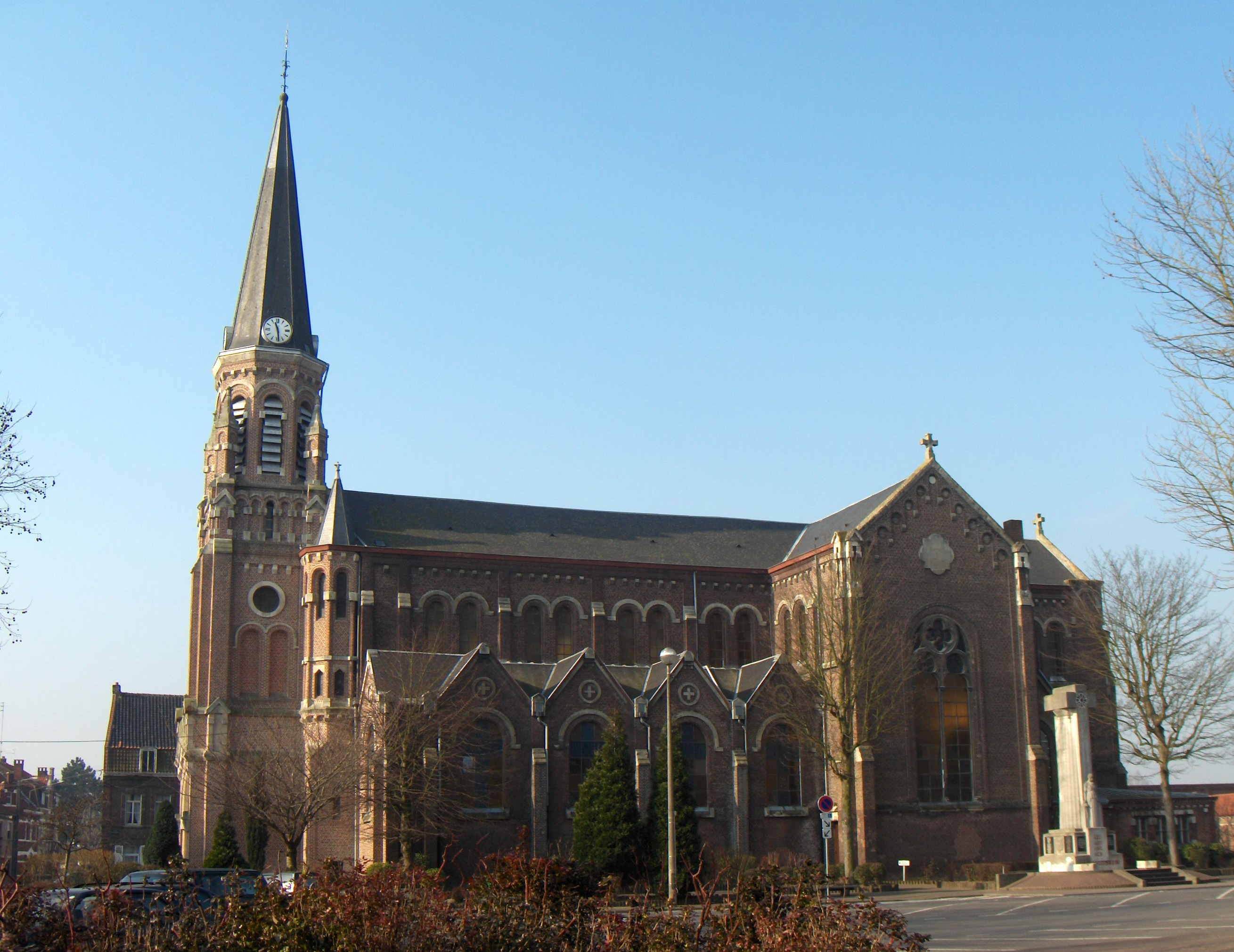 Wervicq-Sud (France, dépt. Nord), église de Notre Dame de l'Immaculée Conception.